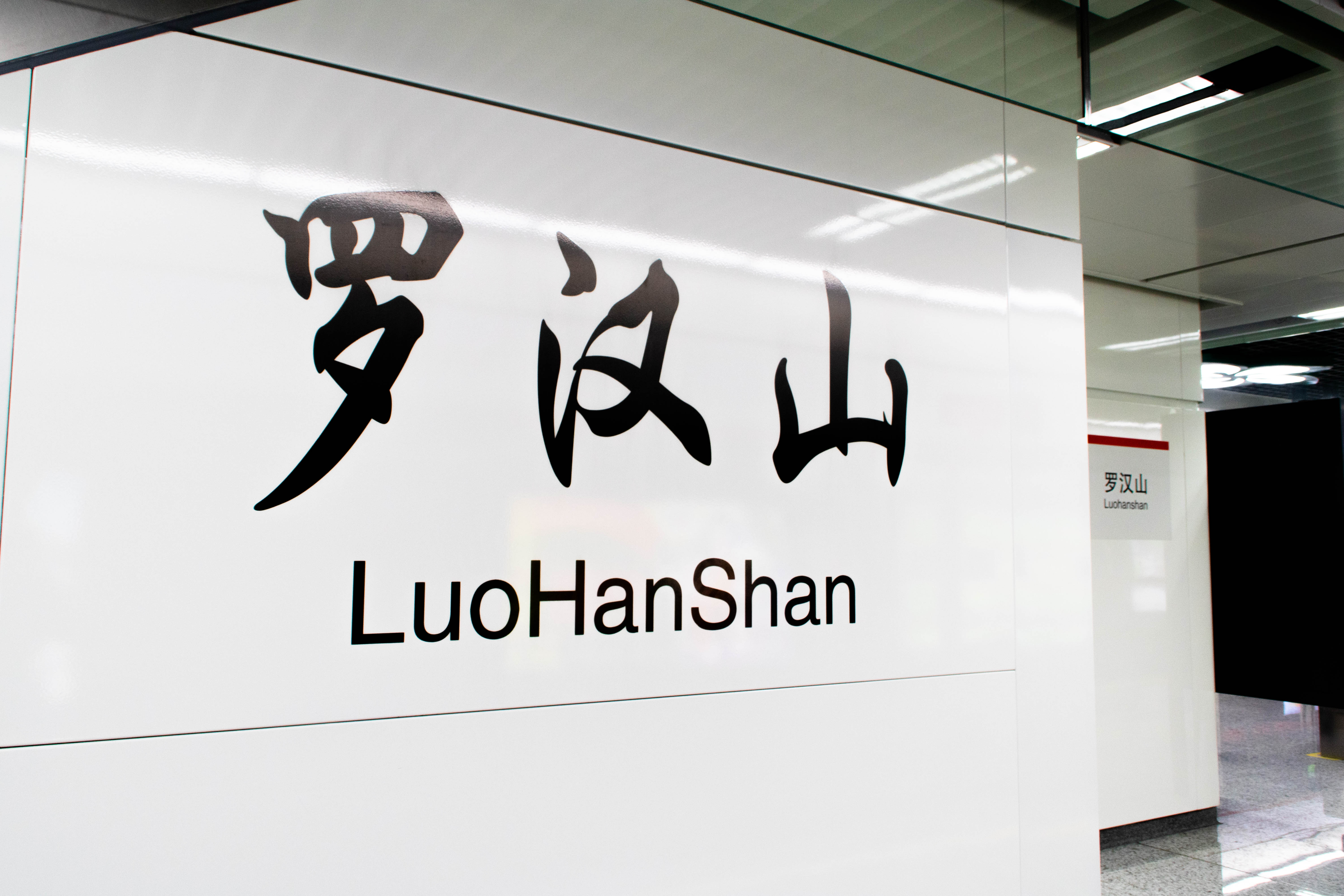 罗汉山站站名壁